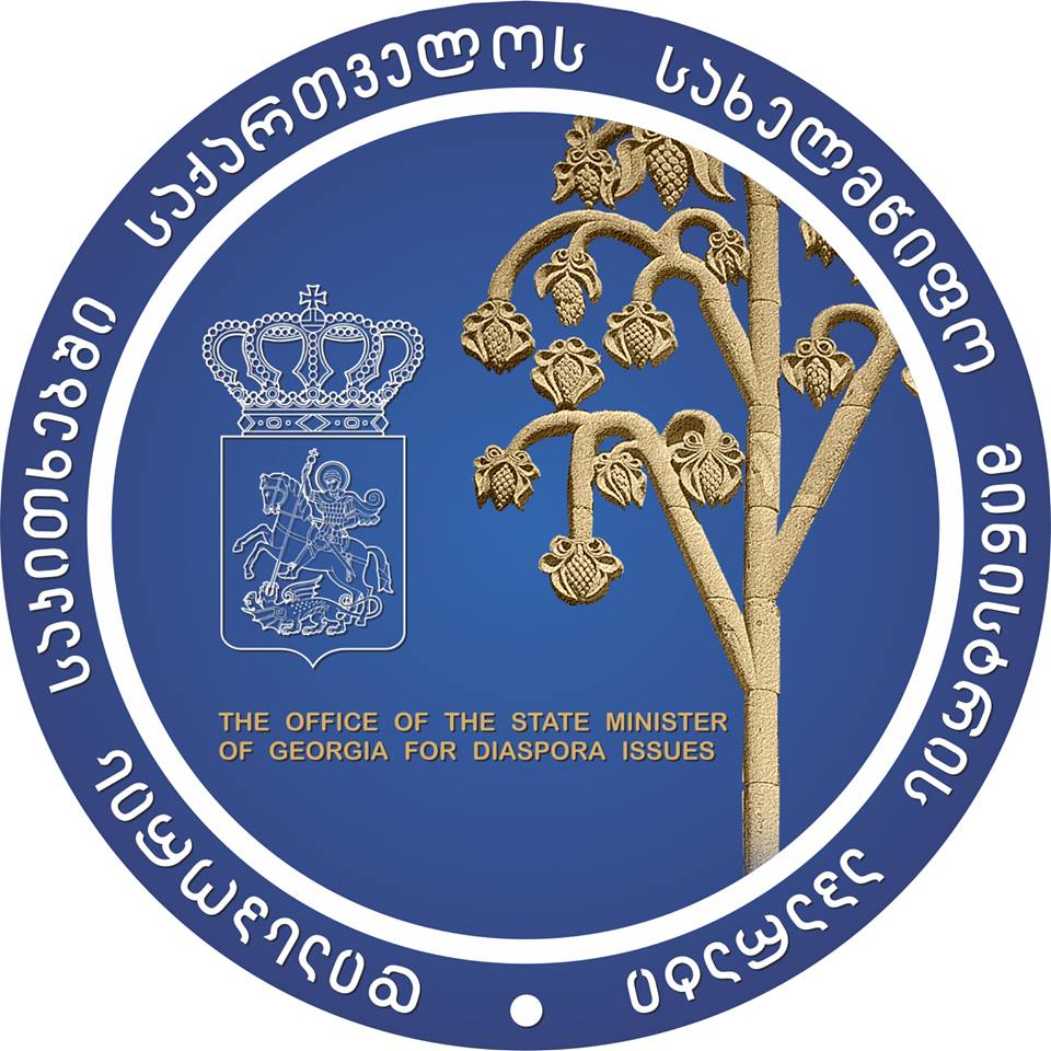 დიასპორის საკითხებში საქართველოს სახელმწიფო მინისტრის აპარატის ლოგო